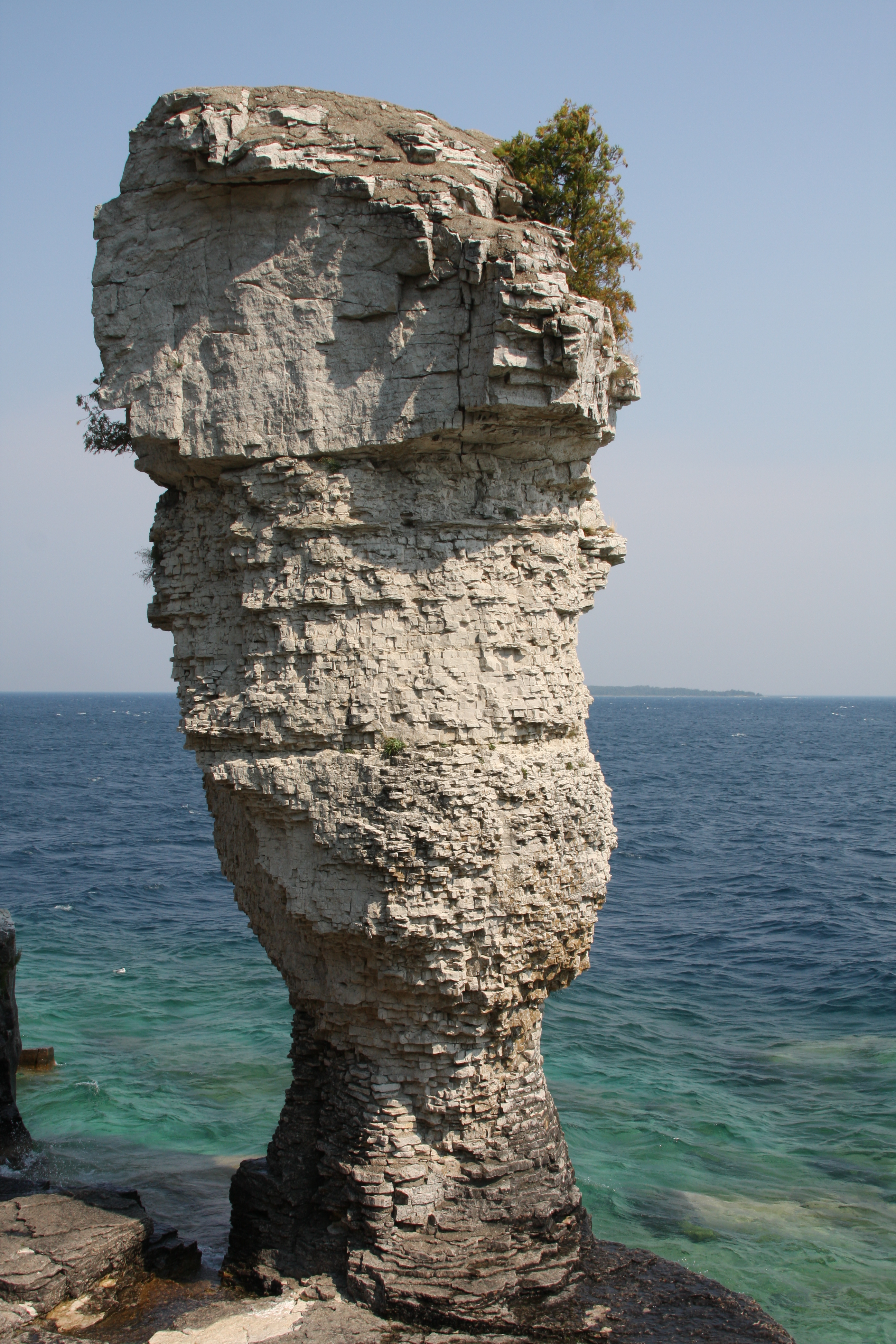 Flowerpot